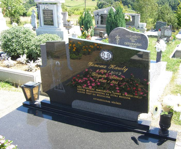 Doncsecz Károly sírja az apátistvánfalvi temetőben